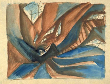 Walter Röhrig Das Cabinet des Dr. Caligari Entwurf Aquarell 1919 29 x 39 cm